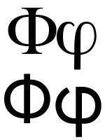 greek letter phi